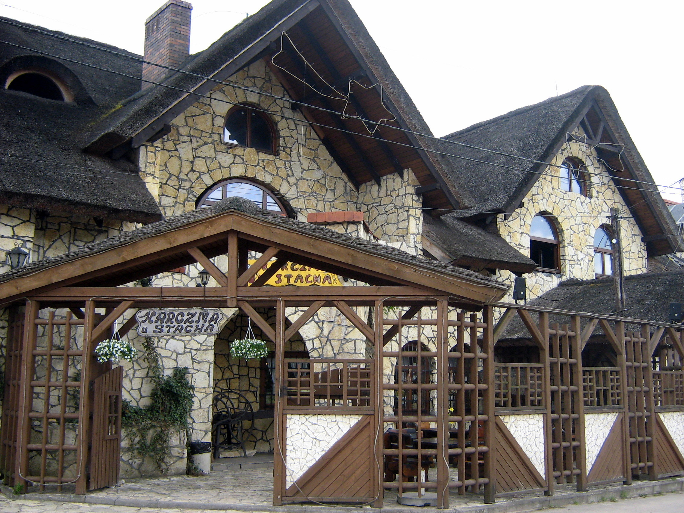 Karczma u Stacha to piwiarnia i restauracja Browaru na Jurze. Z tyłu przylegają do niej pomieszczenia browaru, gdzie warzone jest piwo.